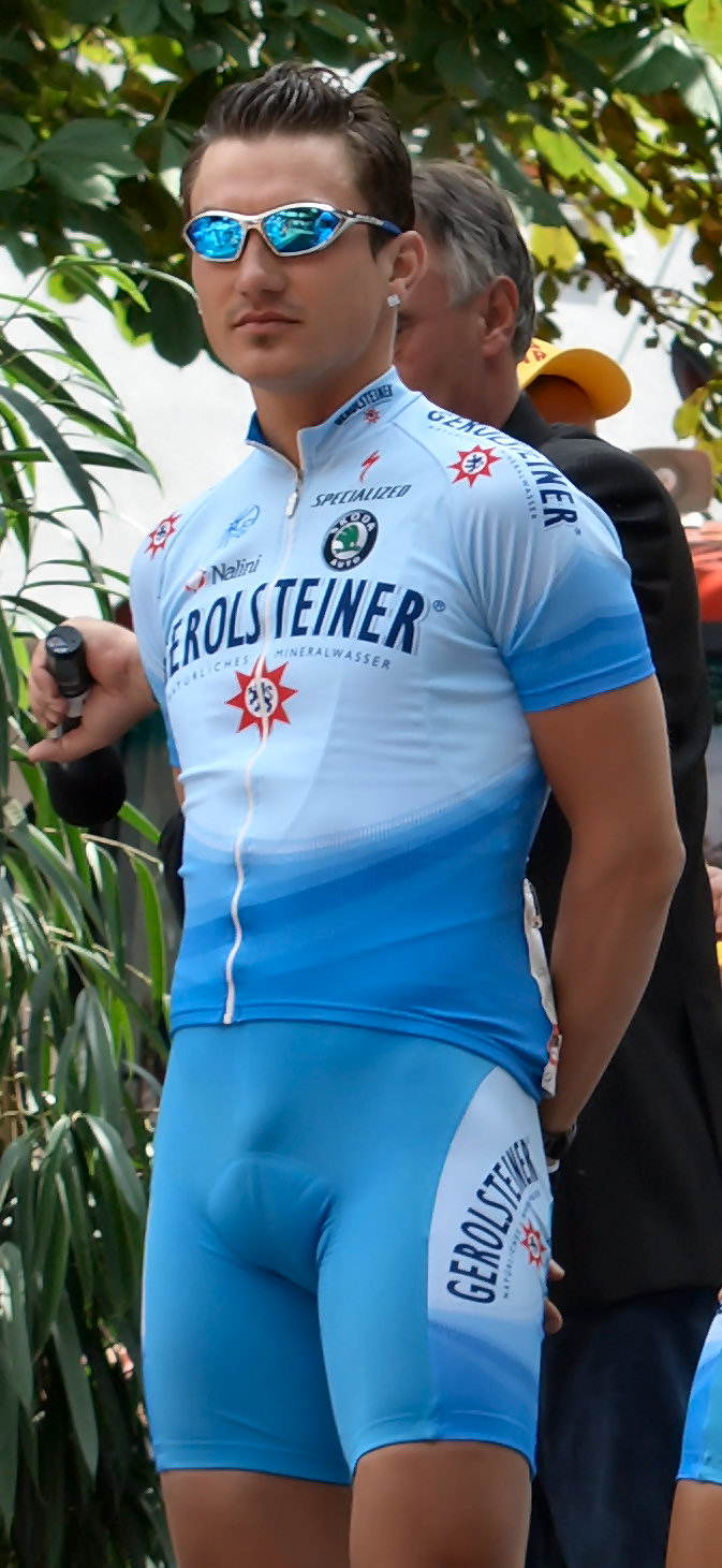 David Kopp at Sparkassen Giro Bochum